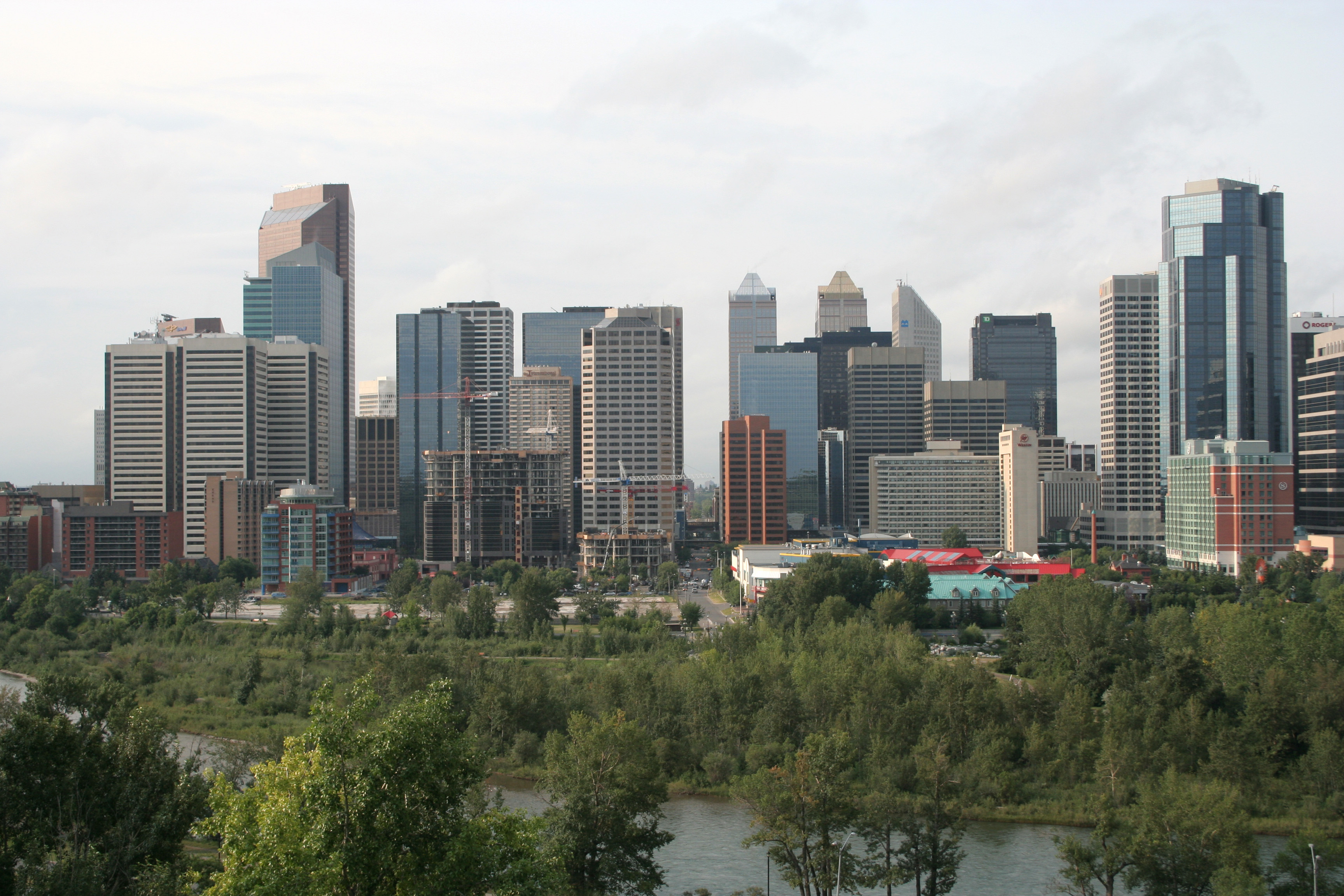 Calgary 1